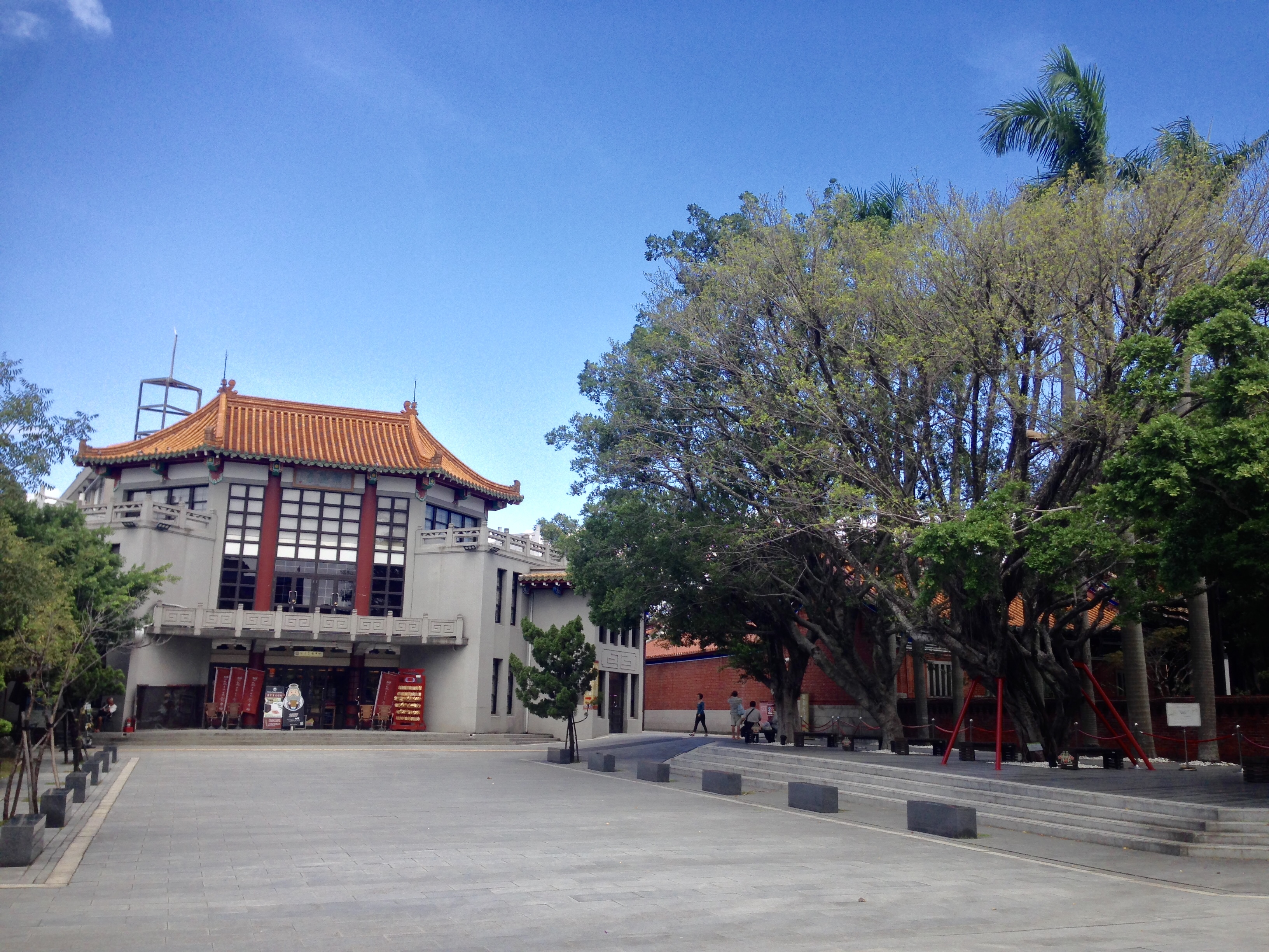 中文（台灣）: 台北孔子廟明倫堂